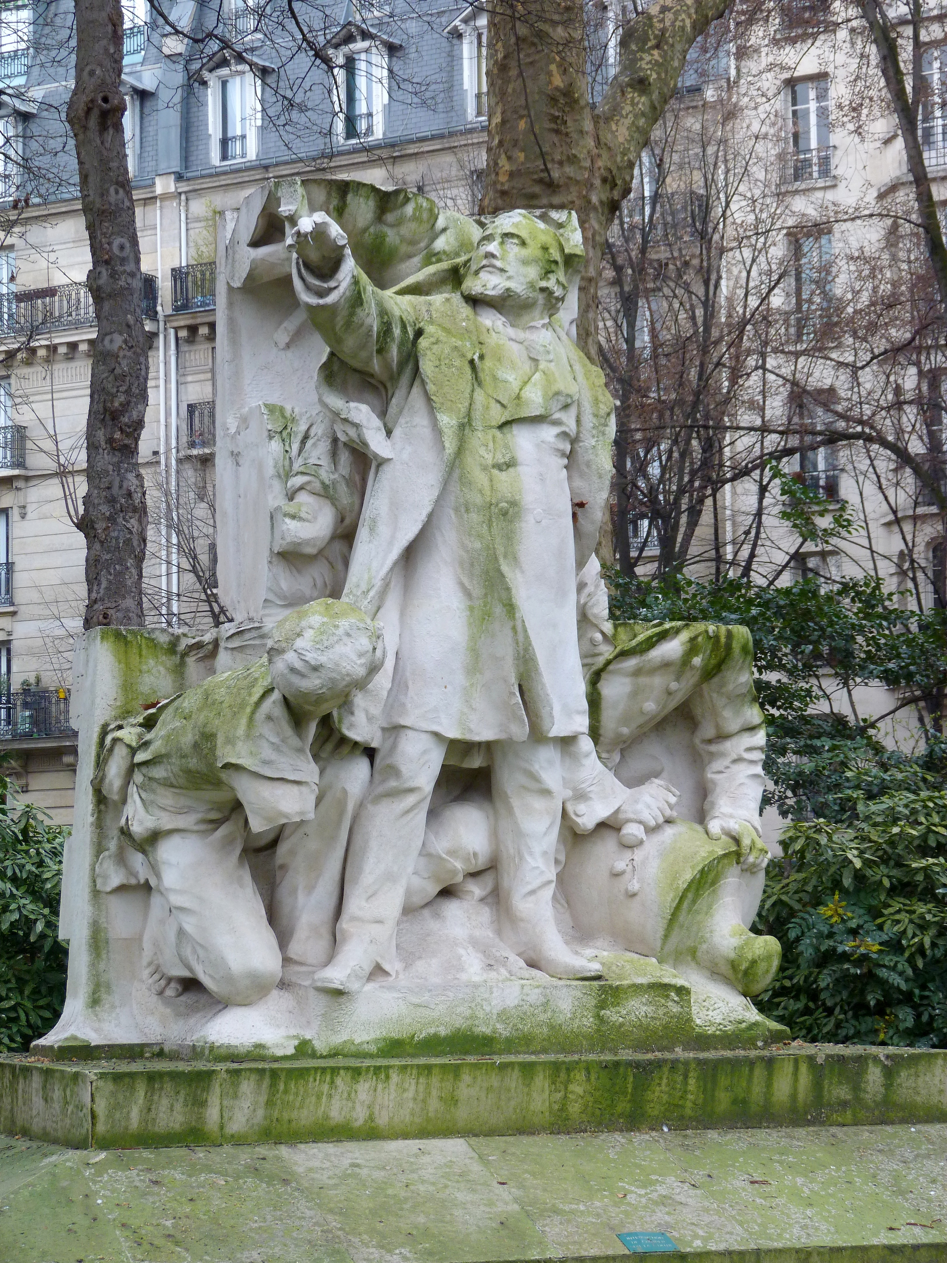 À l'origine, le monument était composé d'un pylône pyramidal dont la base était décorée d'un ensemble de sculptures et cartouches en bronze. Sur la face avant, à mi-hauteur, la statue de pierre du héros devant le drapeau, entouré de plusieurs soldats et pointant une direction. Gravés sur le pylône les épisodes glorieux de la vie du grand homme et des extraits de ses discours, et au sommet, une allégorie en bronze de la Gloire de la démocratie assise sur un aigle aux ailes déployées. Inauguré en 1888 sur la place du Carrousel à Paris, il est démonté en 1954. Une partie du monument fut ré-assemblée et installée dans un square parisien. Une maquette du monument est conservée au musée d'Orsay.